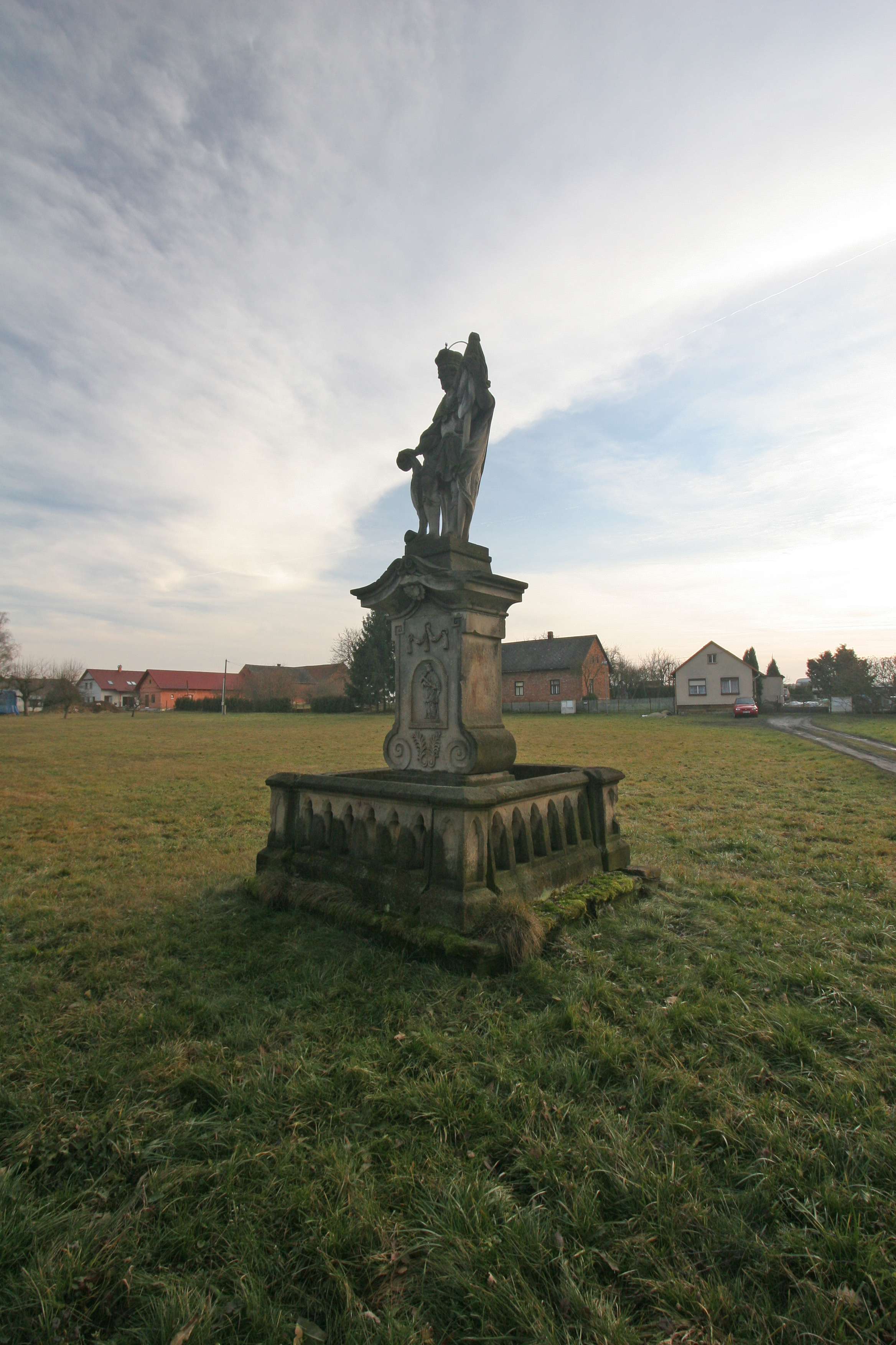 Tereziny Dary - socha sv. Václava